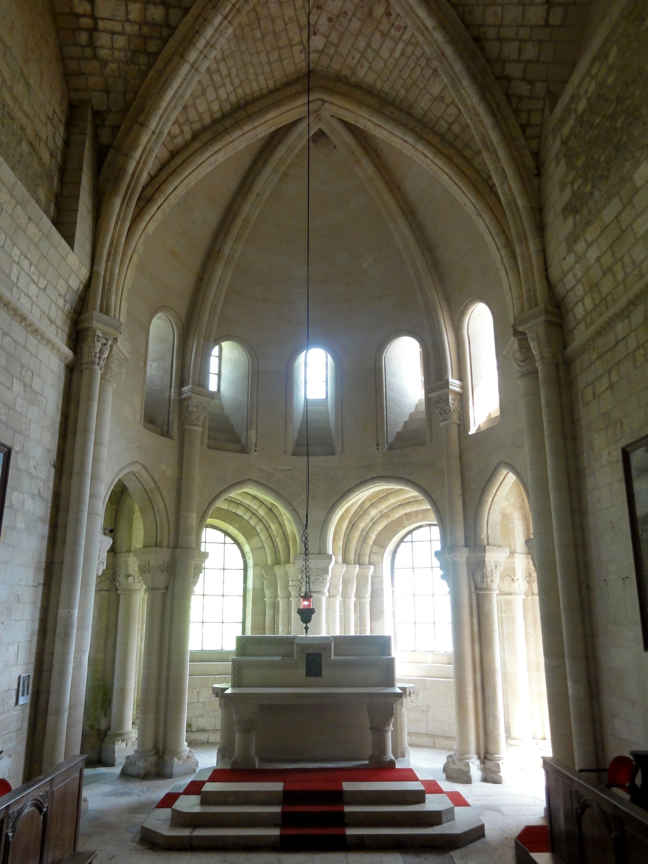 Abside.